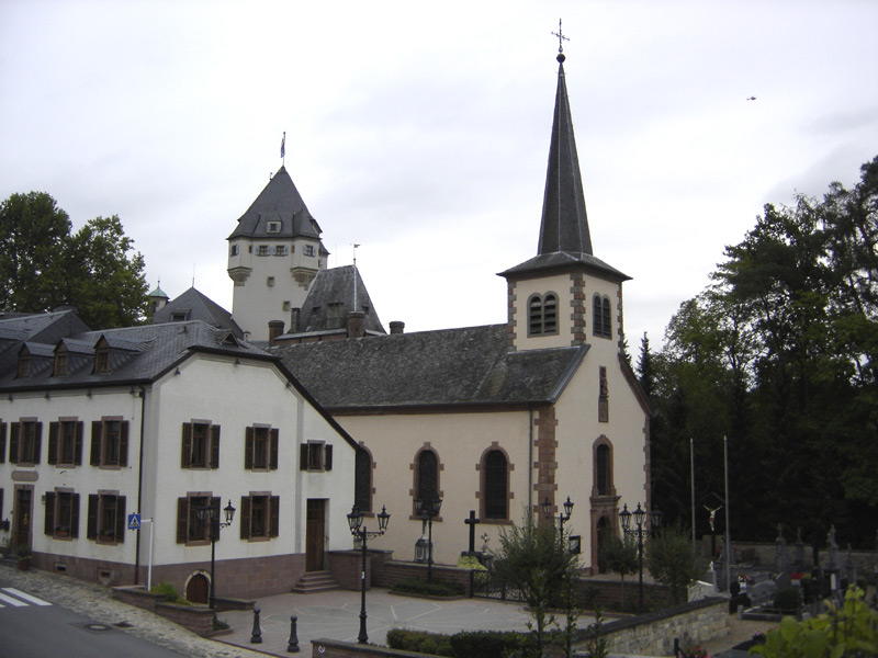 L'église de Colmar-Berg (Luxembourg) et le haut du château grand-ducal